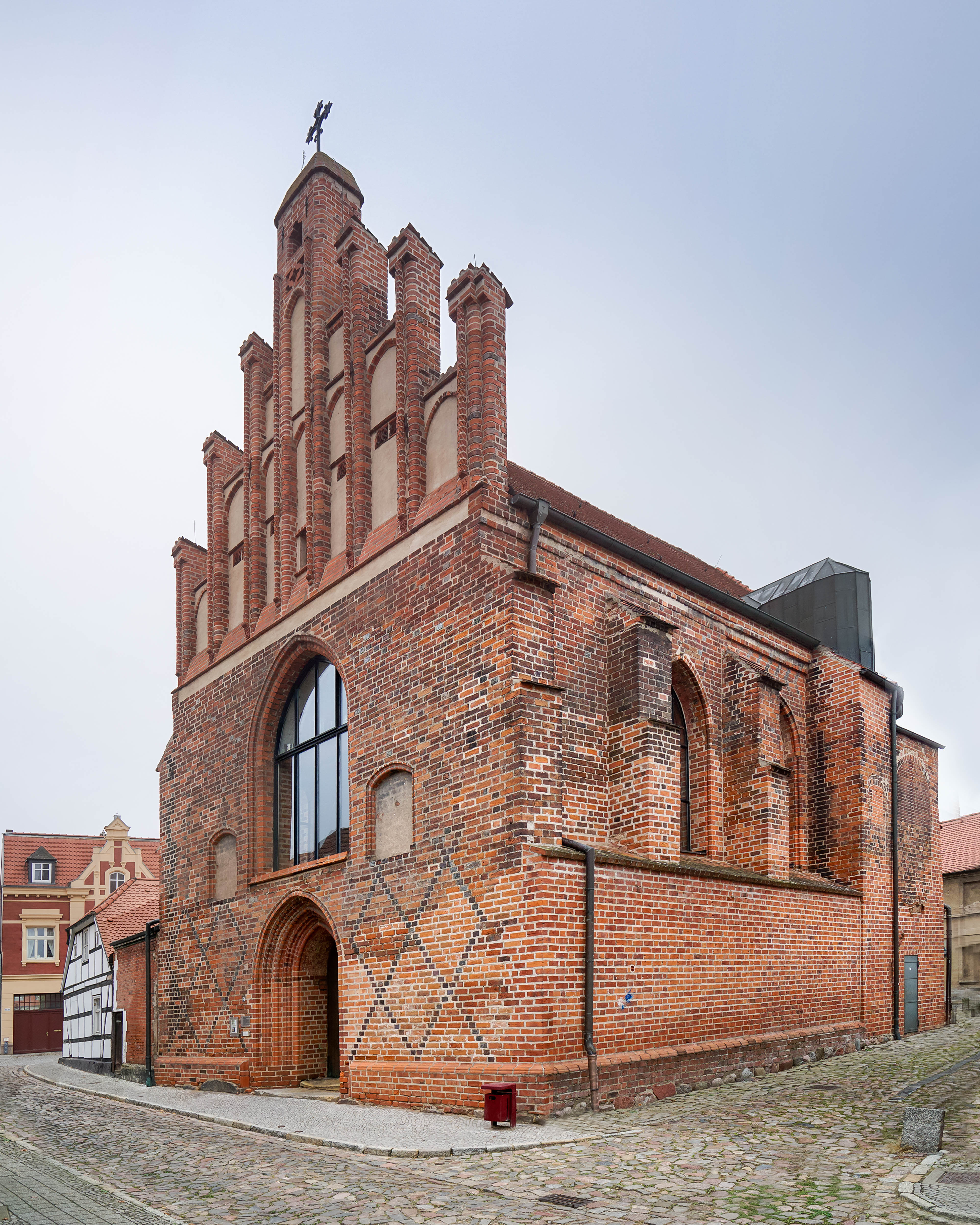 Kapelle des St. Elisabeth-Hospitals (Salzkirche), Zollensteig 20 in Tangermünde